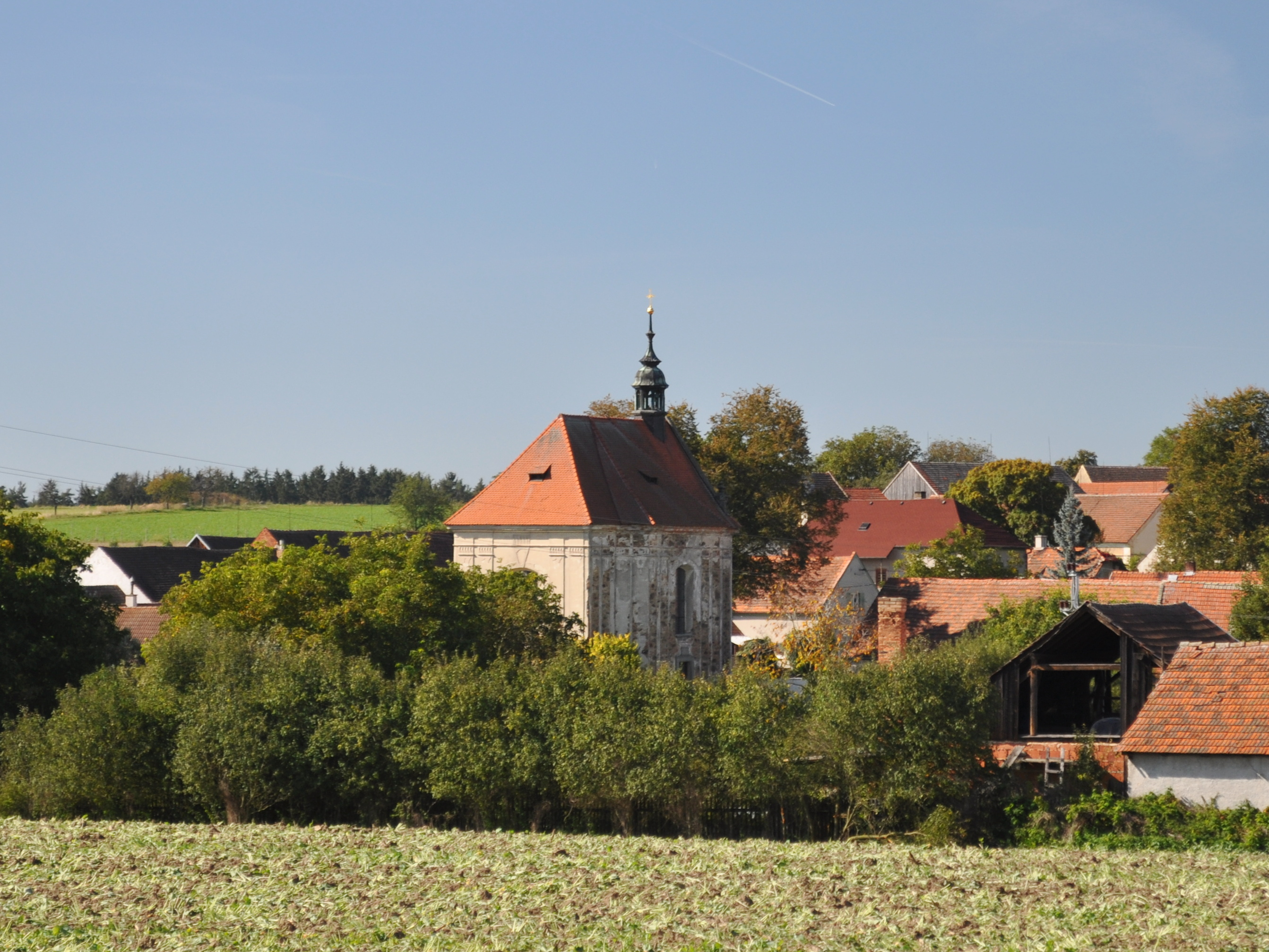 Kaple sv. Jana Křtitele, Hodyně